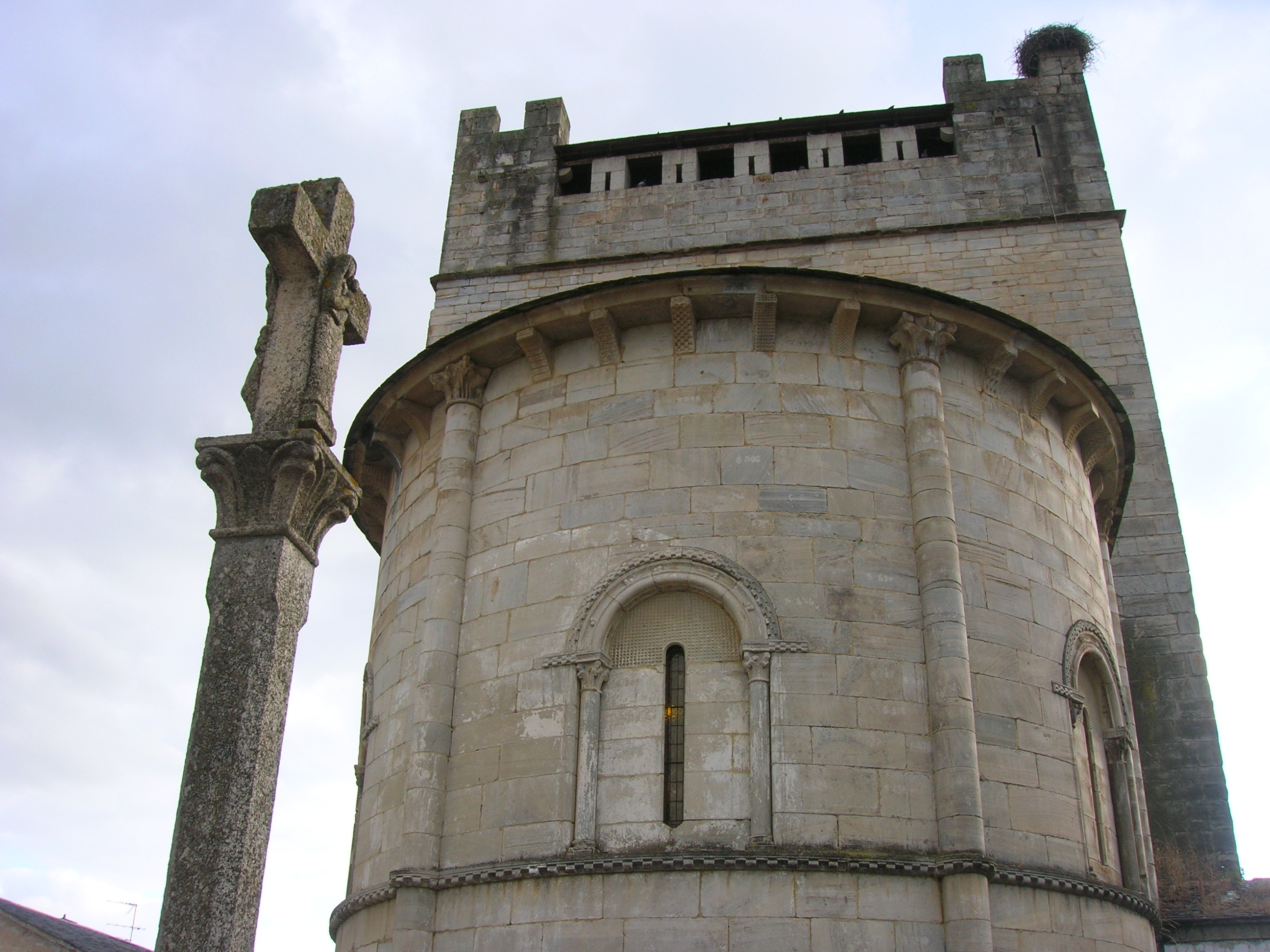 Vista posterior de la Iglesia de San Nicolas y del cruceiro de Portomarín (Lugo, Galiza)